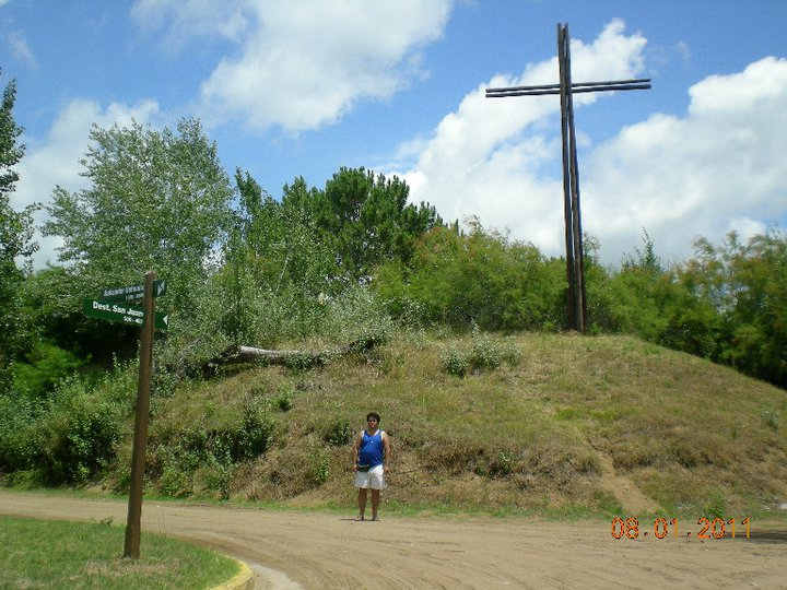 Cruz sobre un médano en la localidad de Aguas Verdes, Partido de La Costa, Pcia. de Buenos Aires, República Argentina